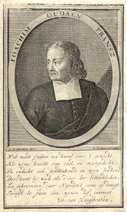 Joachim Oudaan, gravure van Arnold Houbraken en Dirk Jonckman, met onderschrift van David van Hoogstraten.